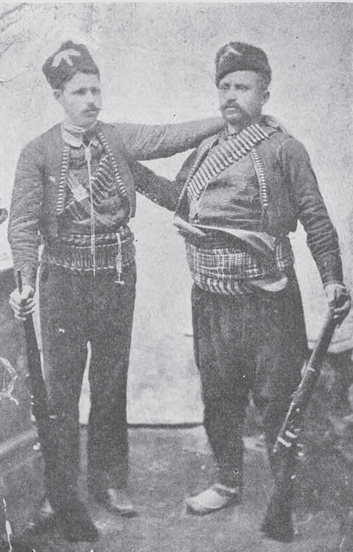 Filip Chakarov and Tashko Tsvetkov